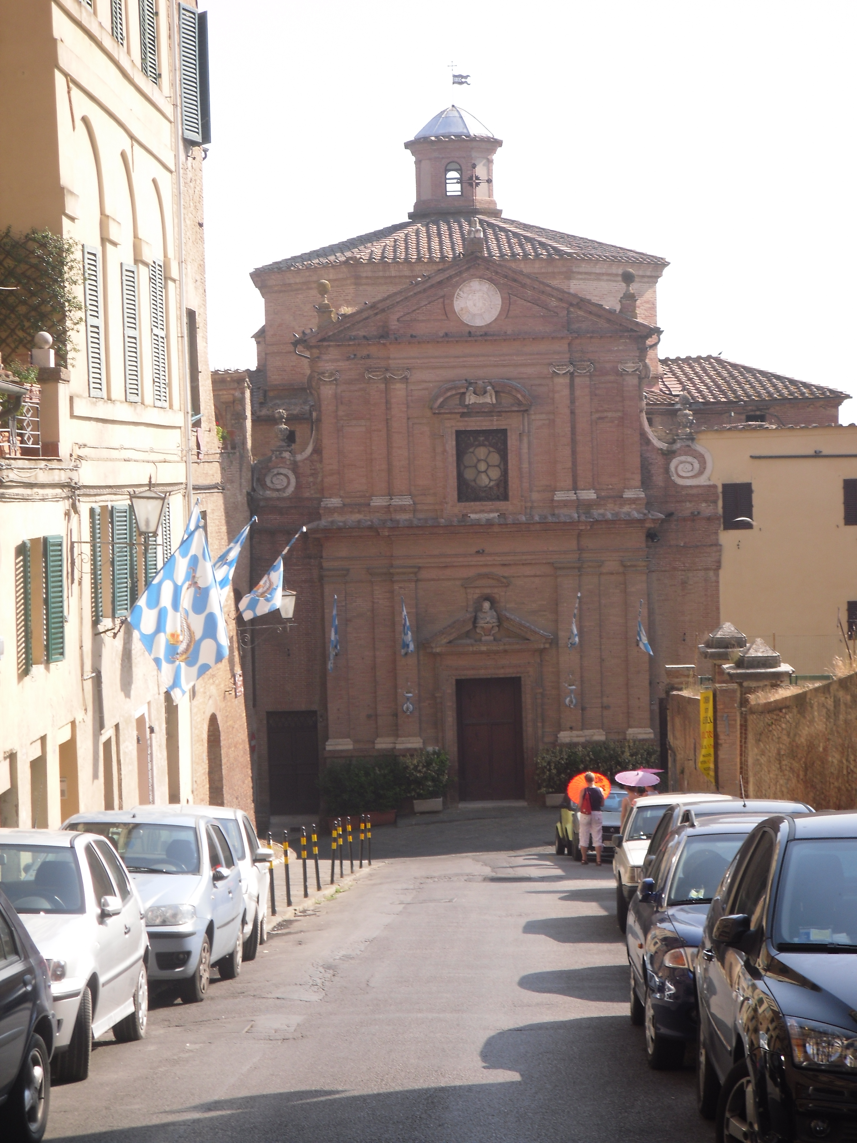 Chiesa di San Giuseppe, oratorio della Contrada Capitana dell'Onda (Siena)